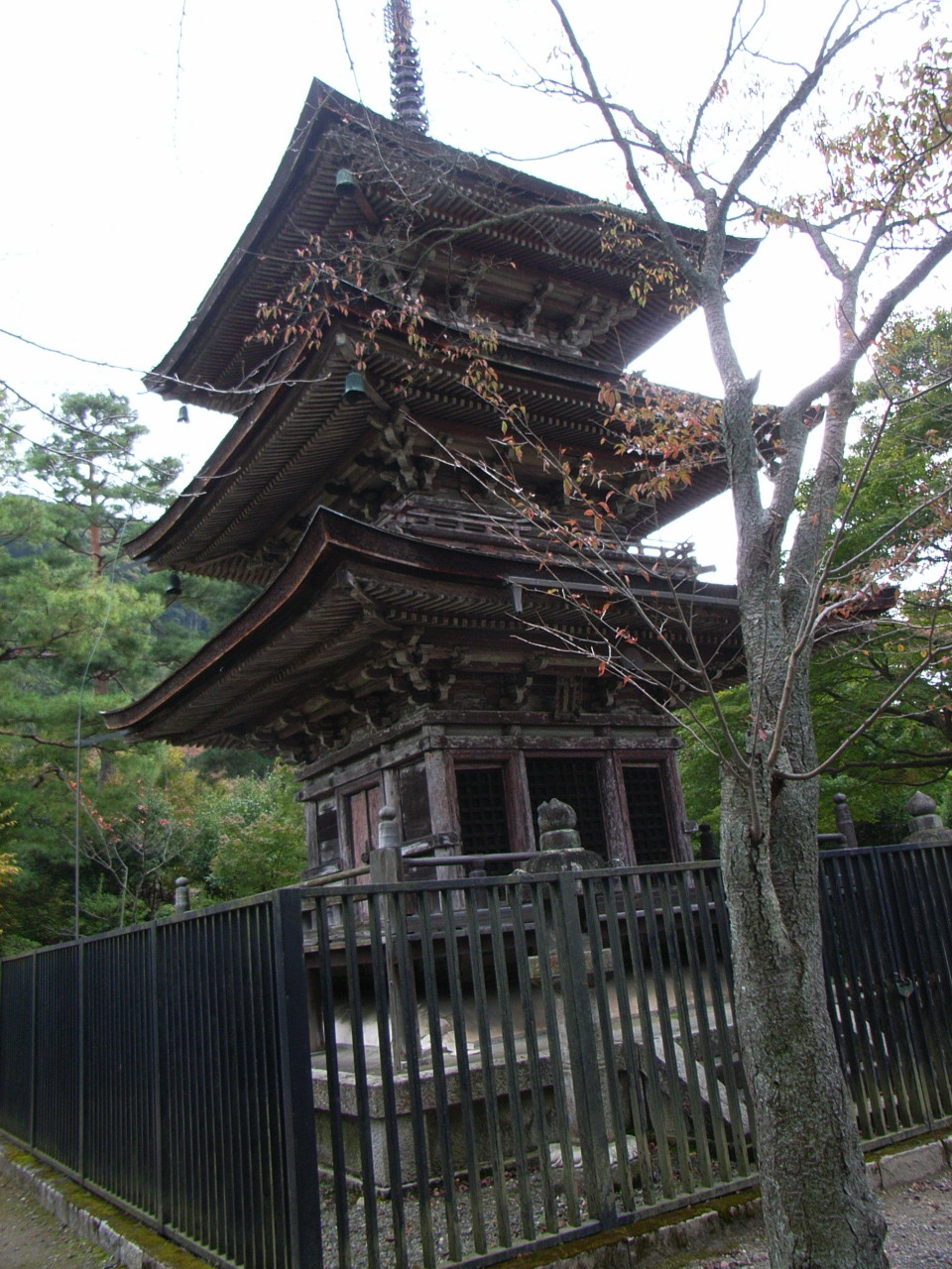 Храм Кёмидзу-дера Храм Кёмидзу-дера в Киото, старая пагода